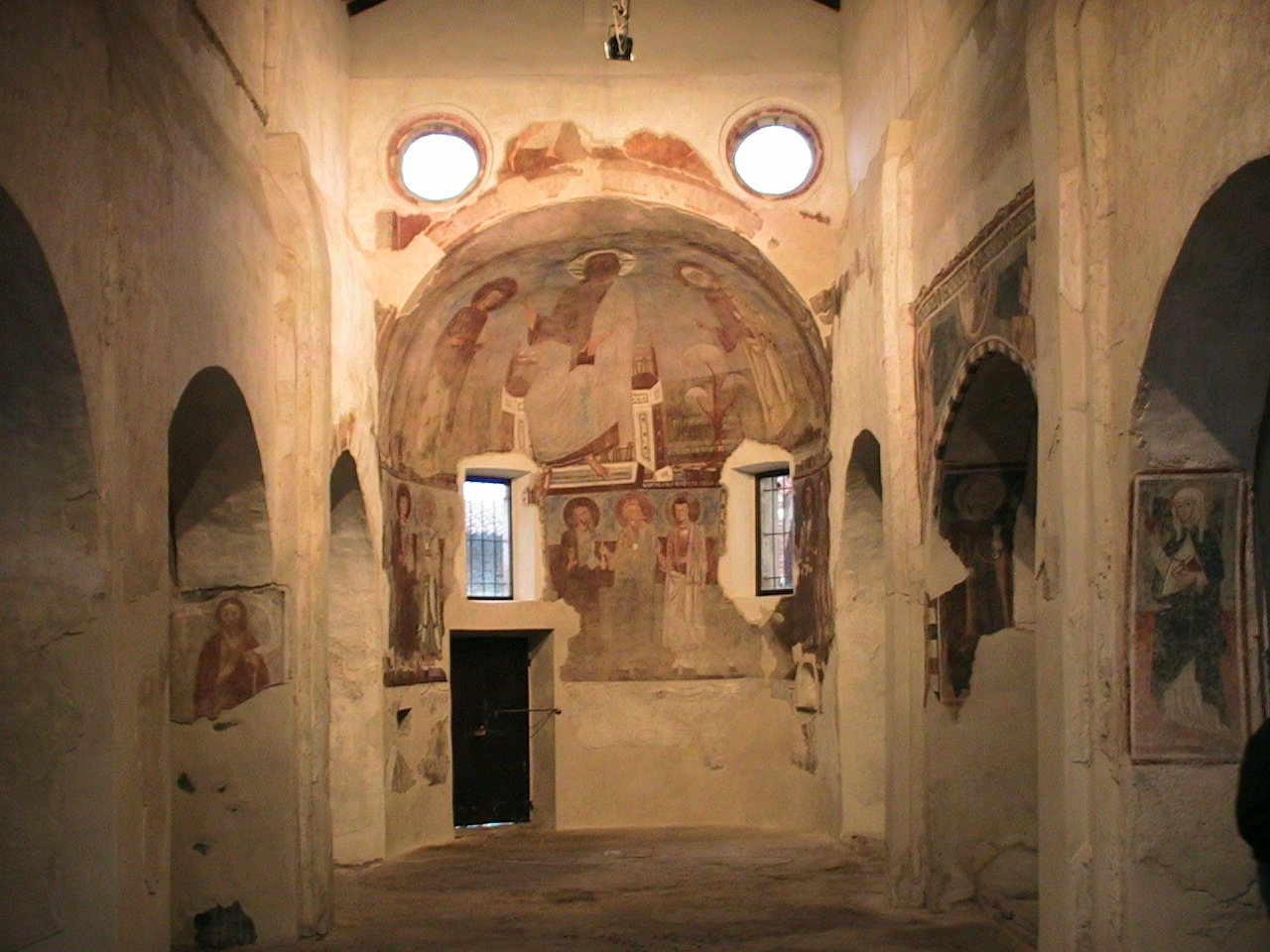 Chiesa di San Pietro (Carpignano Sesia) RBell 19:44, 9 apr 2007 (CEST)